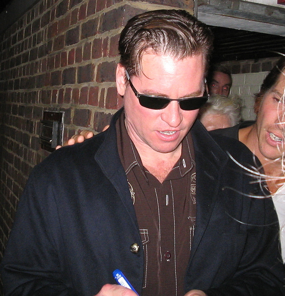 Val Kilmer.